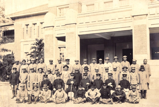 中文（台灣）: 1936臺灣原住民泰雅族領袖樂信．瓦旦（林瑞昌）與部落頭目等於新竹州廳前。